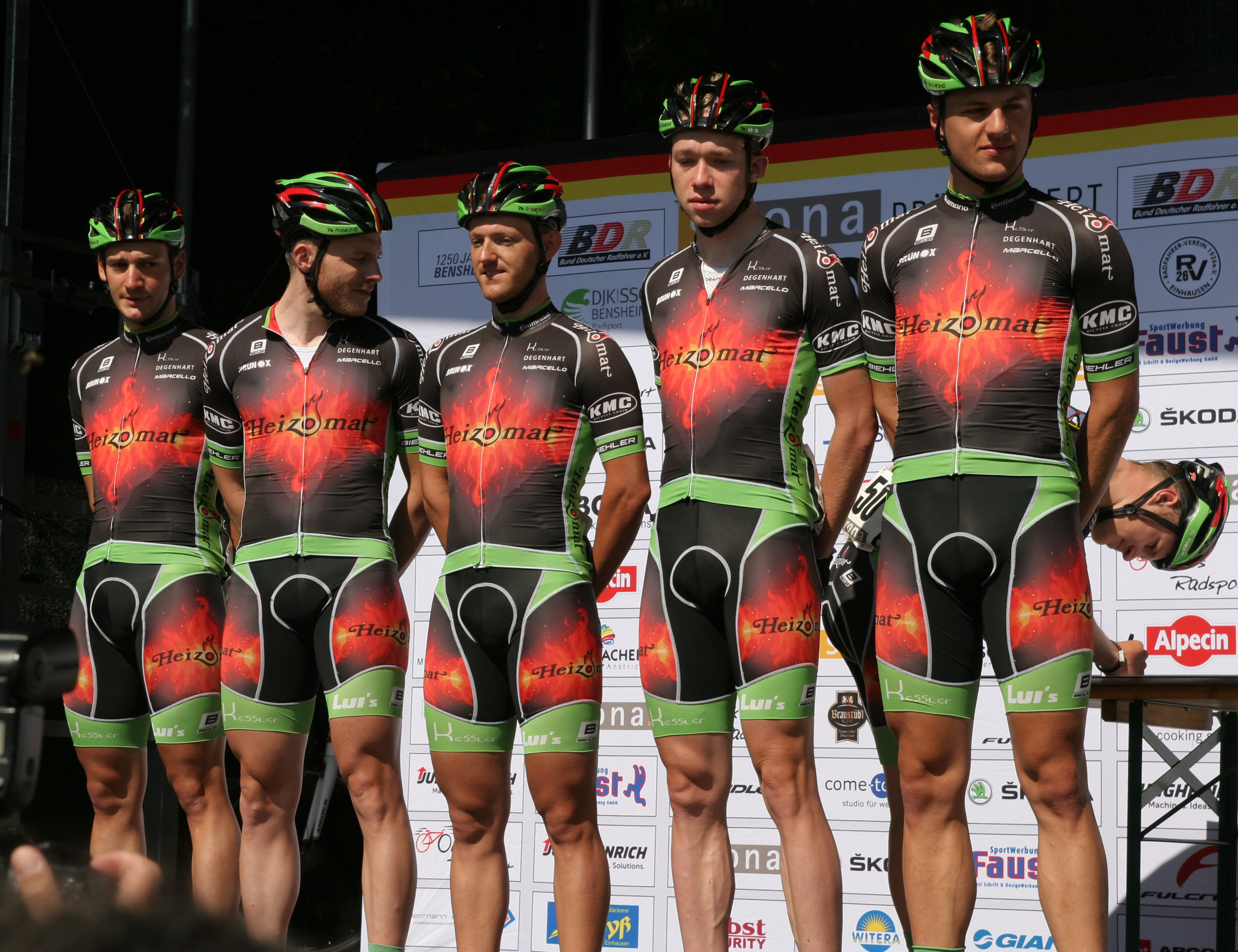 Team Heizomat bei der Vorstellung vor dem Rennen. Foto von den Deutschen Meisterschaften im Straßenrennen der Männer (Elite) am 28. Juni 2015 in Bensheim (Hessen)